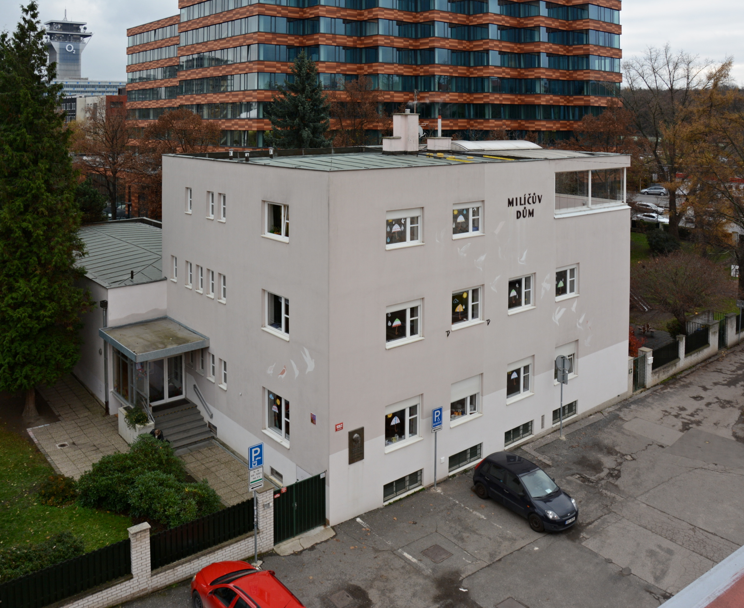 Erwin Katona: Milíčův dům.